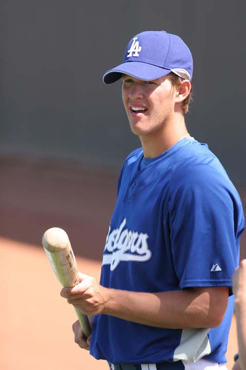 Photo by Craig Y. Fujii 02:23, 12 May 2008 . . 480×720 (63.5KB) . . Craigfnp